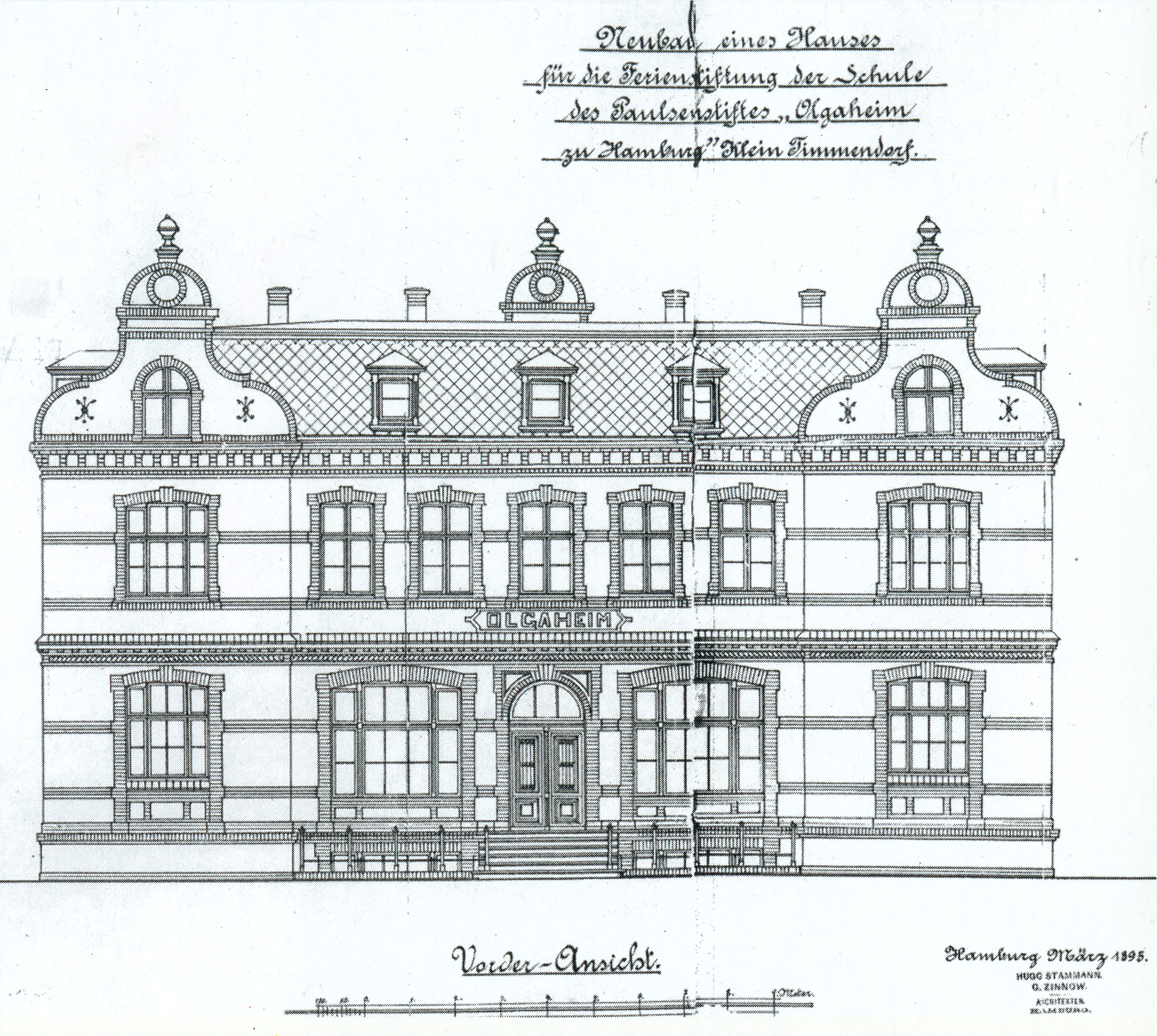 Bauansicht Olgaheim Timmendorfer Strand